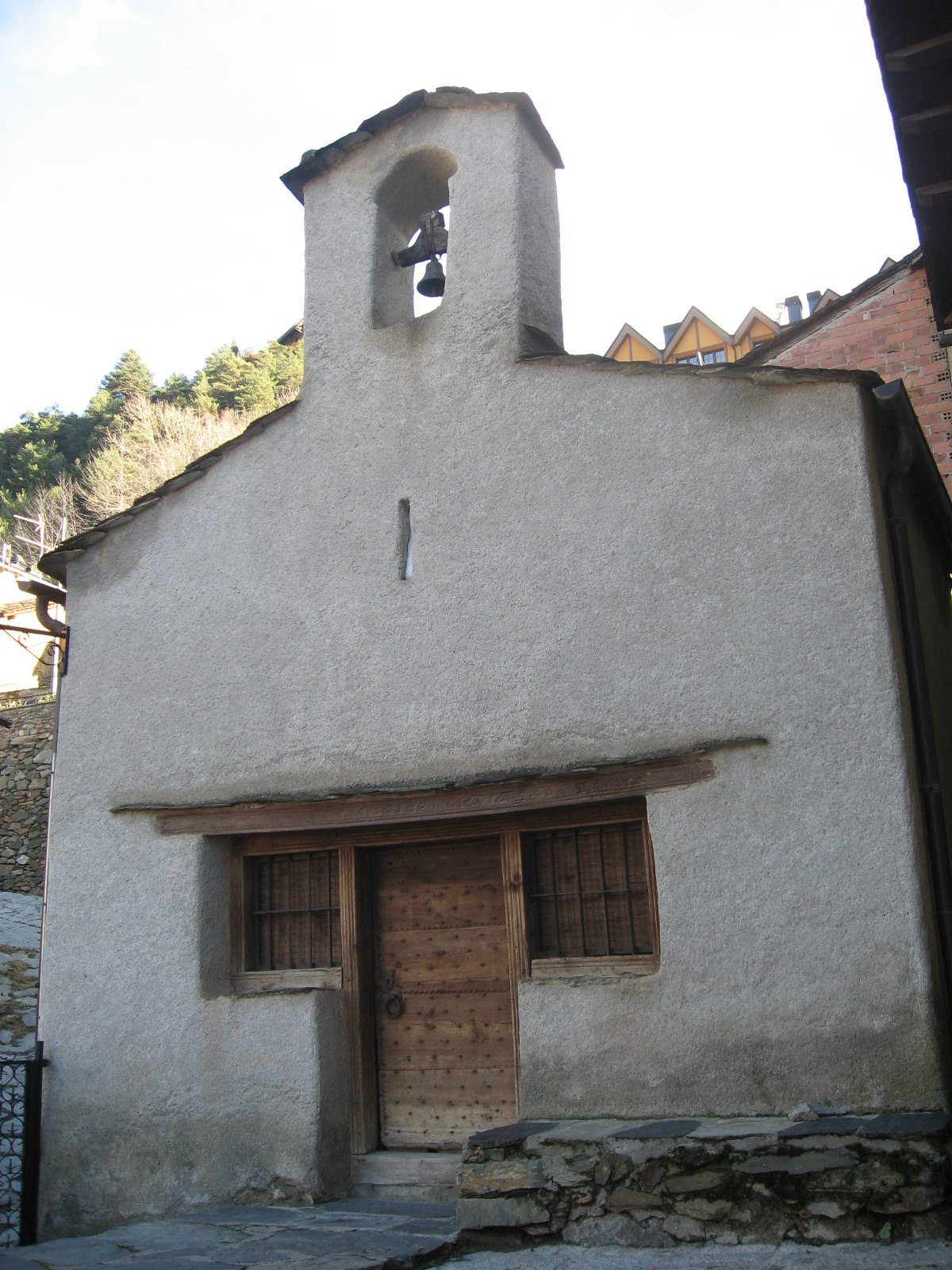 Església de Sant Pere d'Aixirivall